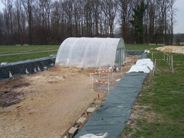 Ausgrabung bei Kalkriese, eigenes Bild, GFDL